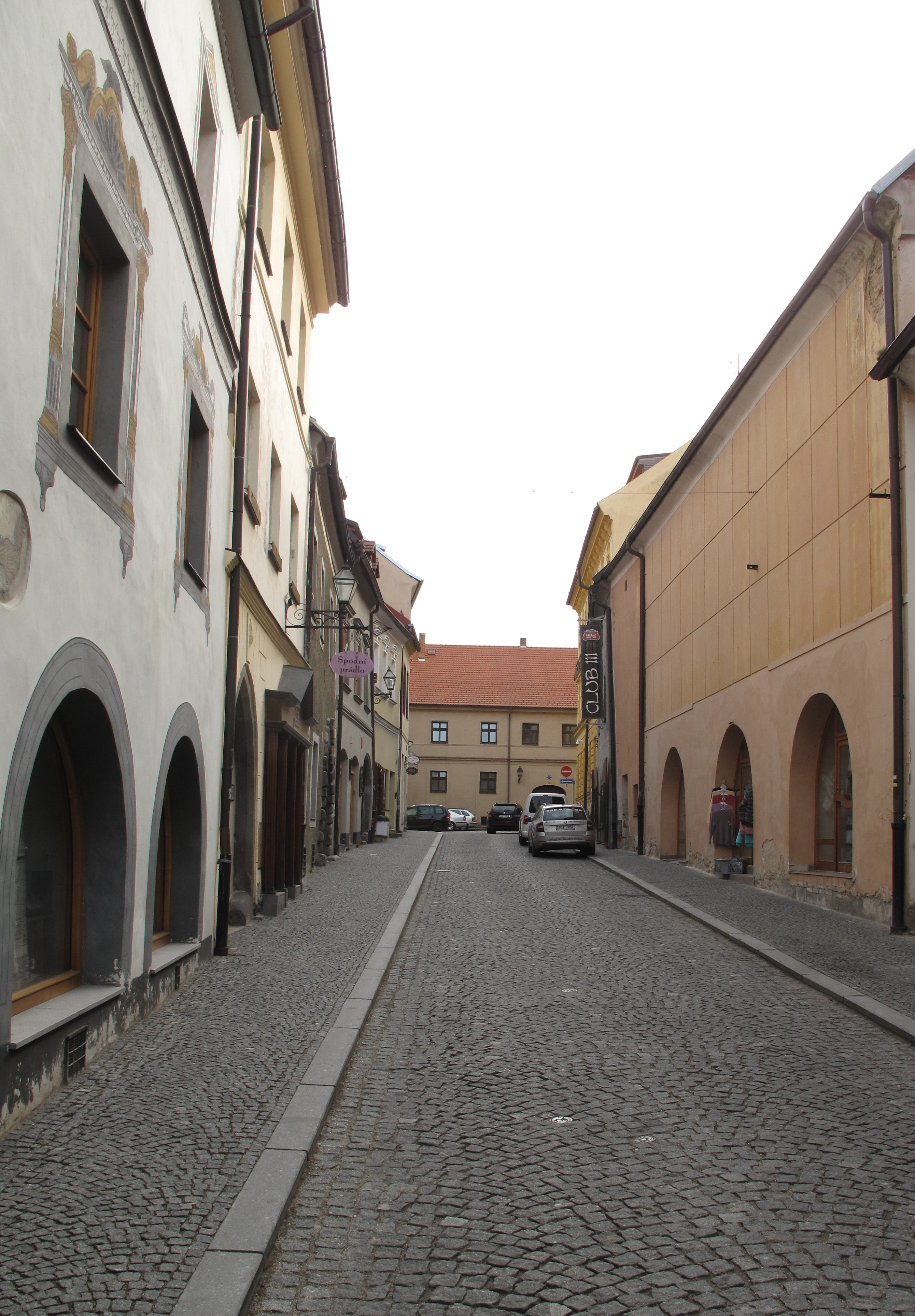 Ulice Křišťanova v Prachaticích. Česká republika.